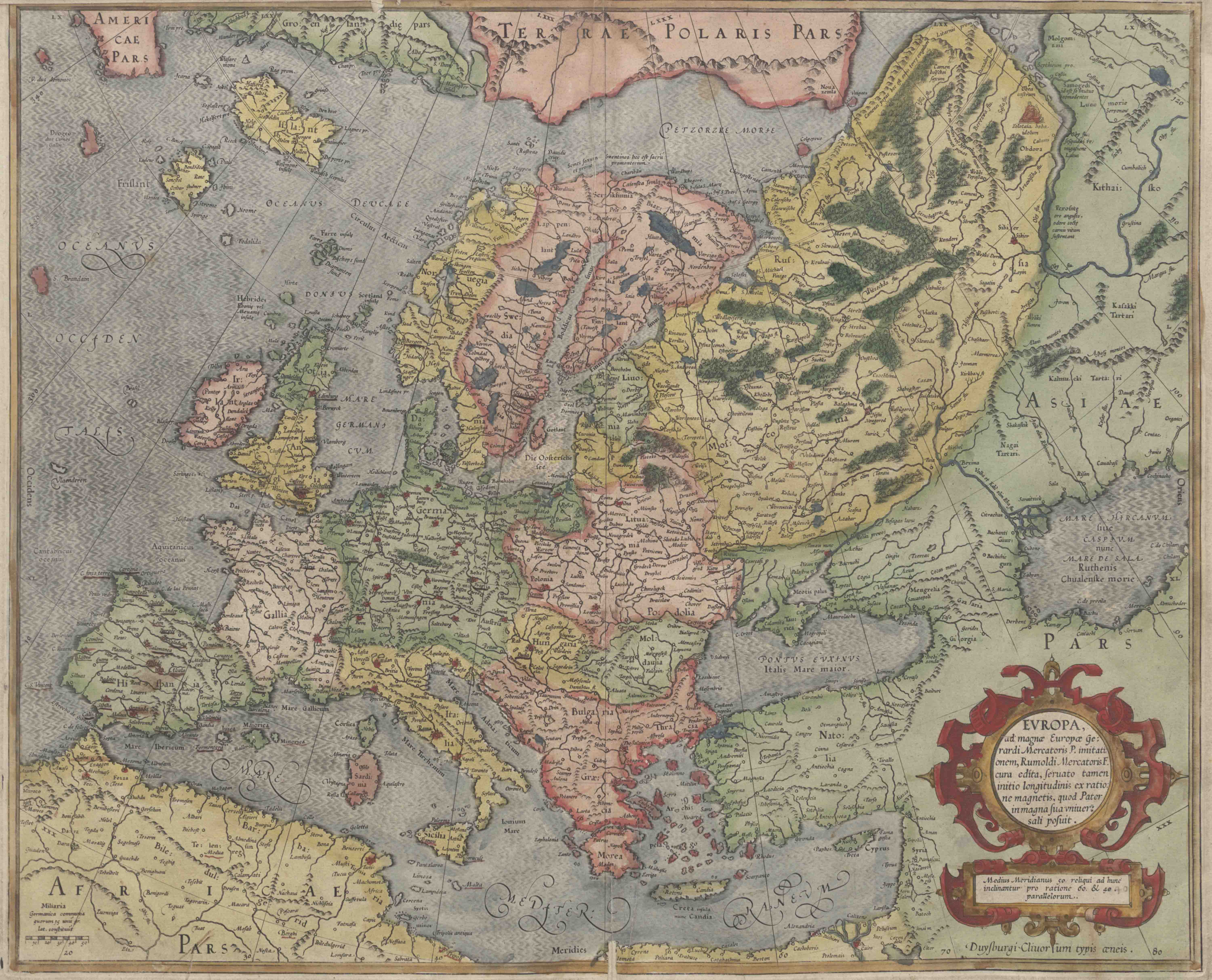 Europa ad magnae Europae ... photoshopped